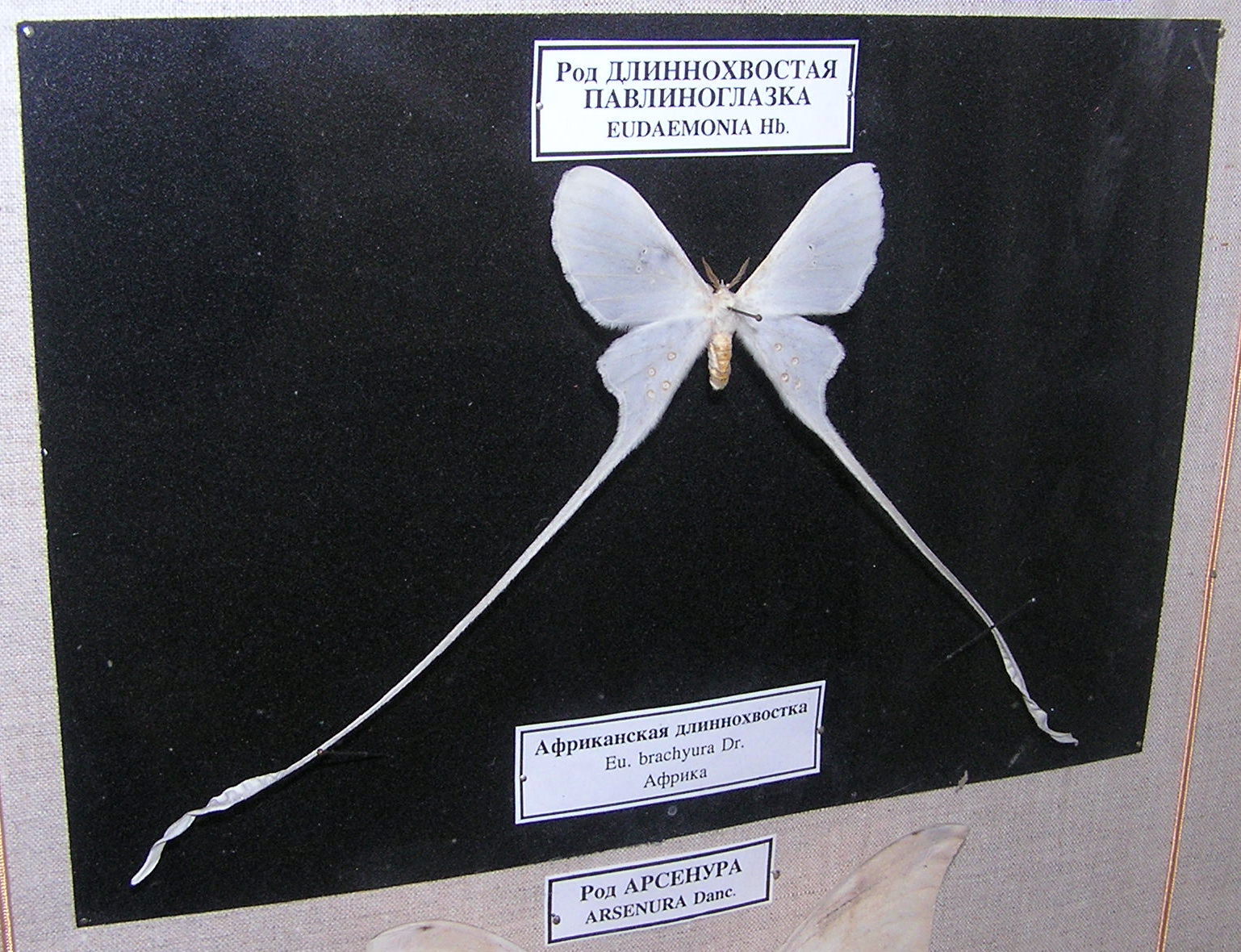 Eudaemonia argus